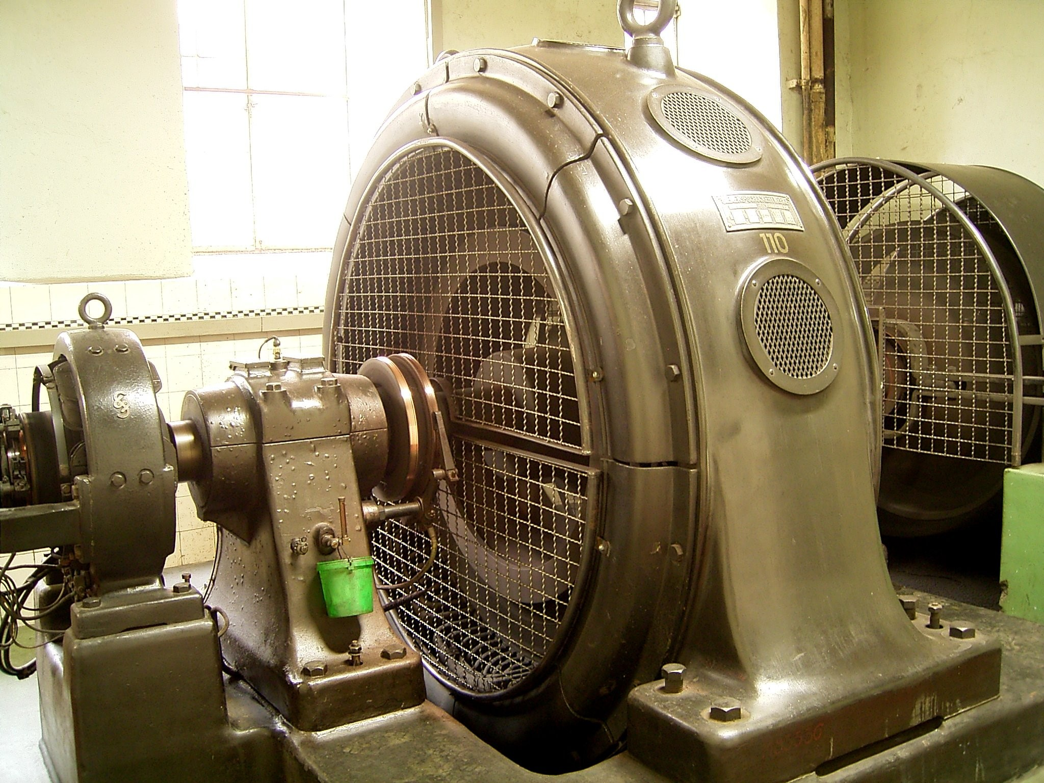 Kraftwerk Dahlerau im Wülfing-Museum in Radevormwald-Dahlerau